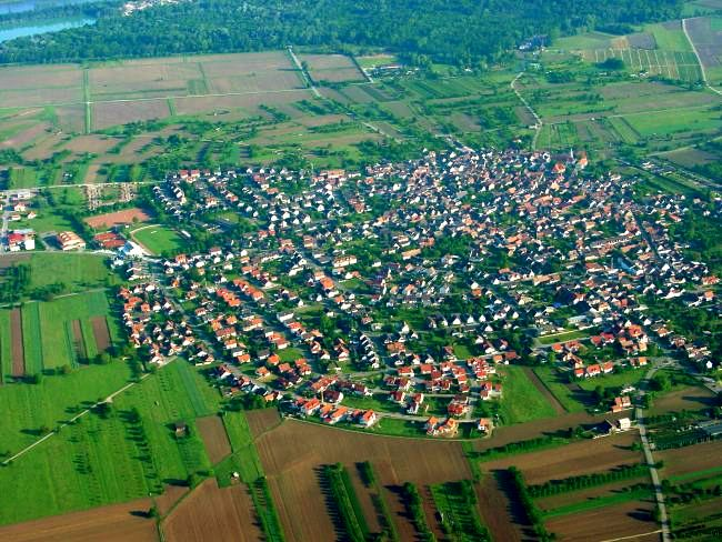 Photograph: Luftfahrer = Norbert Blau Beschreibung: Luftbild von Wyhl aufgenommen bei einer Ballonfahrt mit dem Ballonteam Norbert Blau Quelle: Selbst photographiert im Juni 2003 Weitere Luftbilder von Wyhl